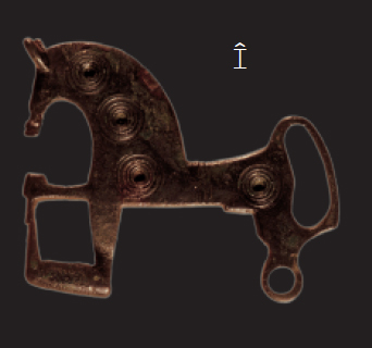 Zaldiaren eskultura fibula batean